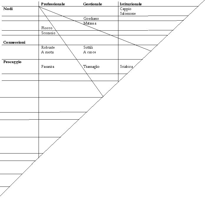 Lavoro di rete